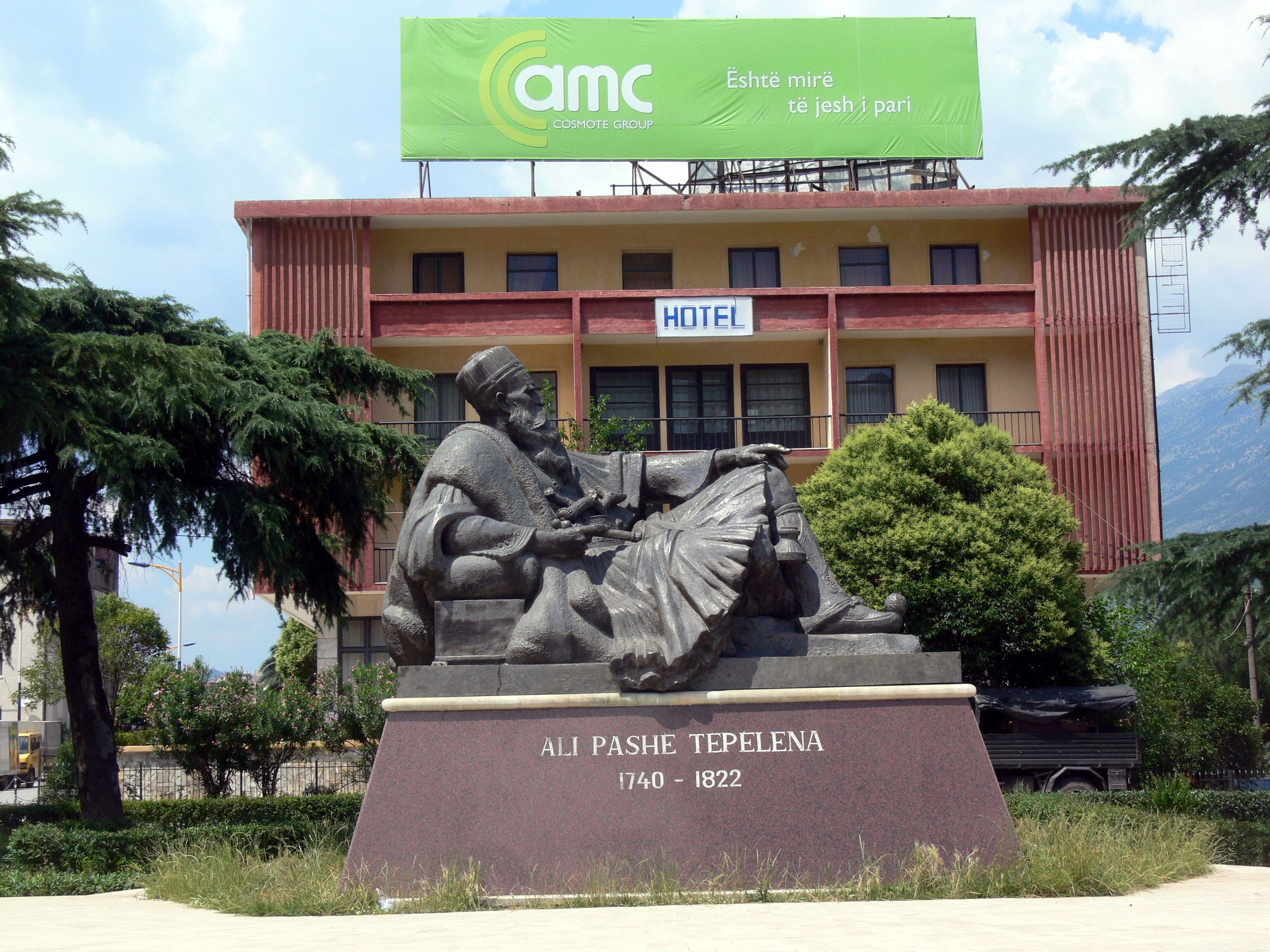 Ali Pasche Denkmal in Tepelena